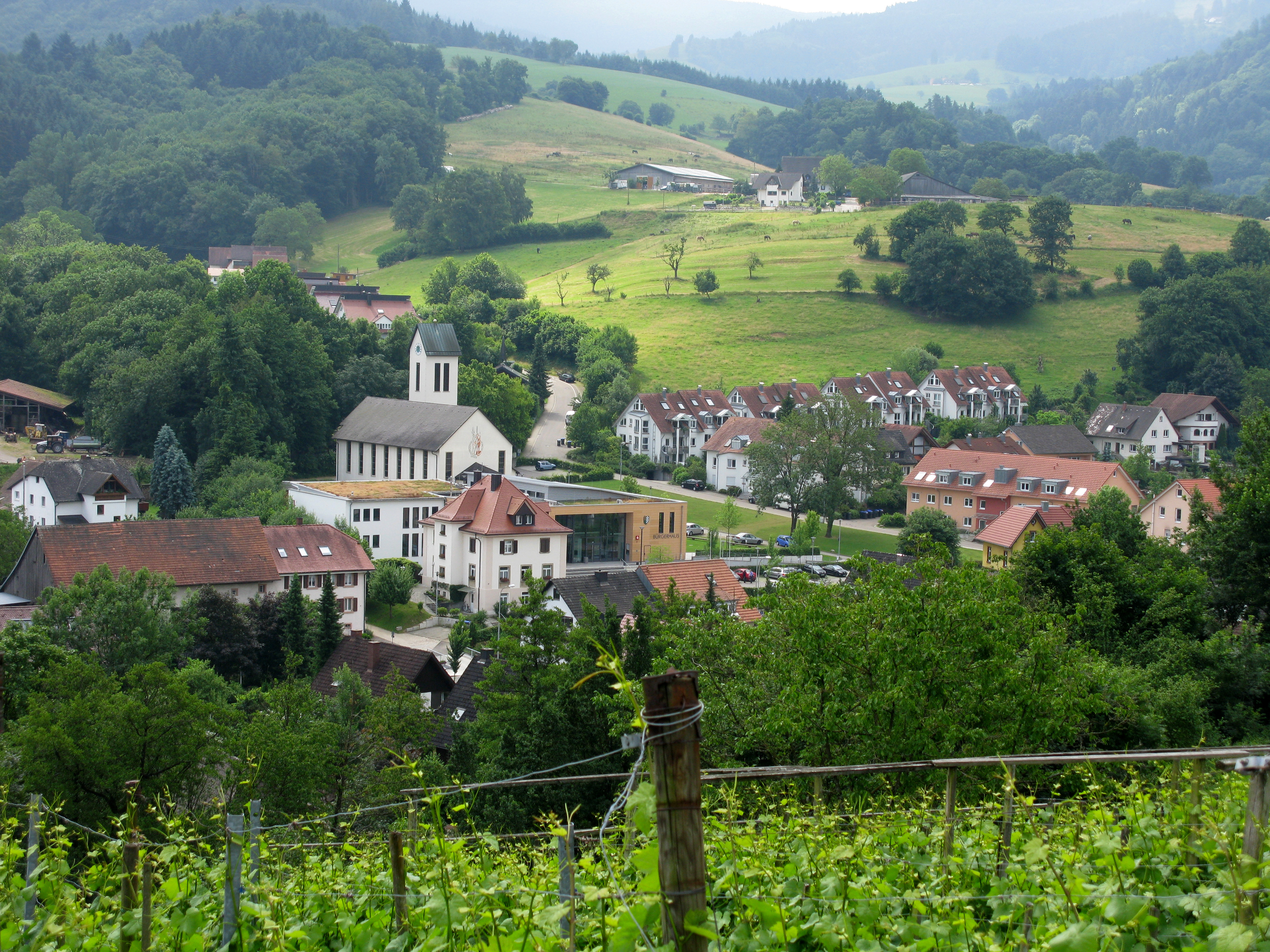 Au vom Bettlerpfad mit Rathaus, Bürgerhaus und Kirche St. Johannes (hintereinander)